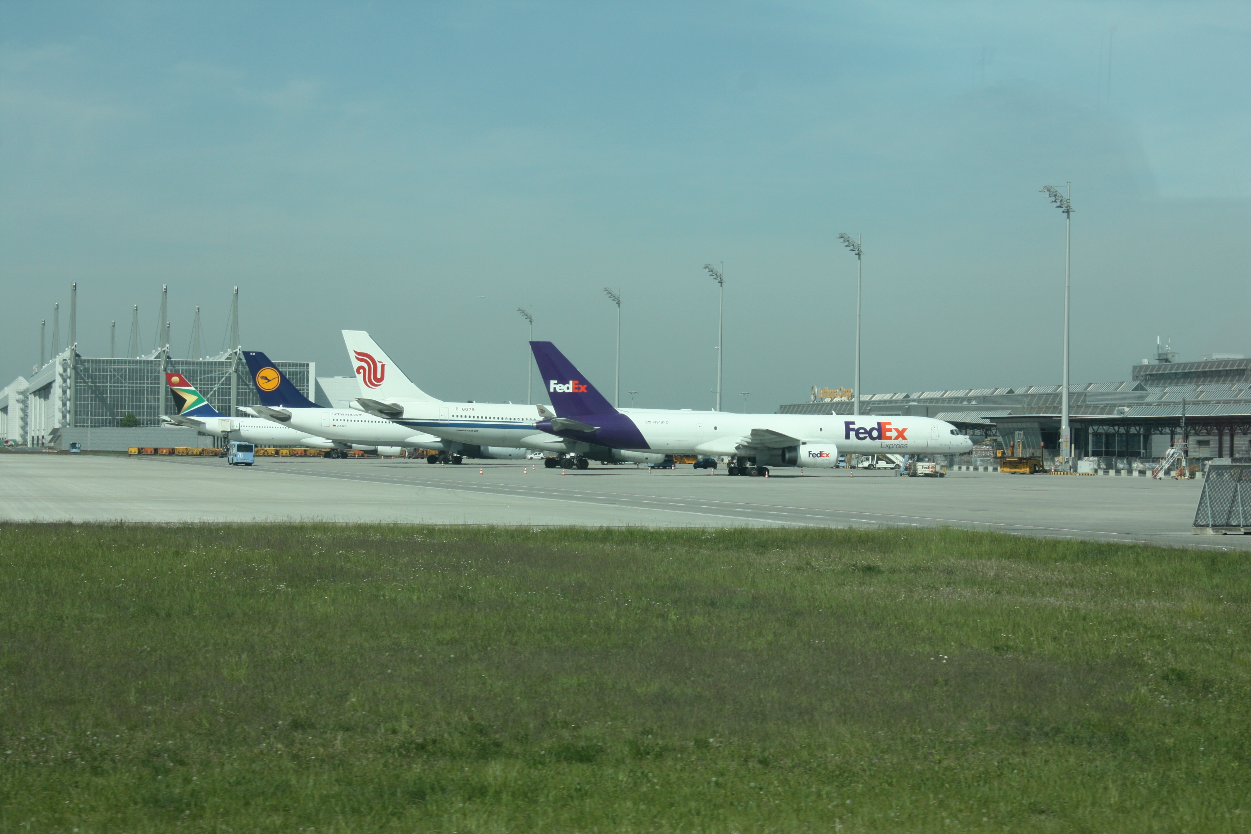 Cargo Terminal, Flughafen München